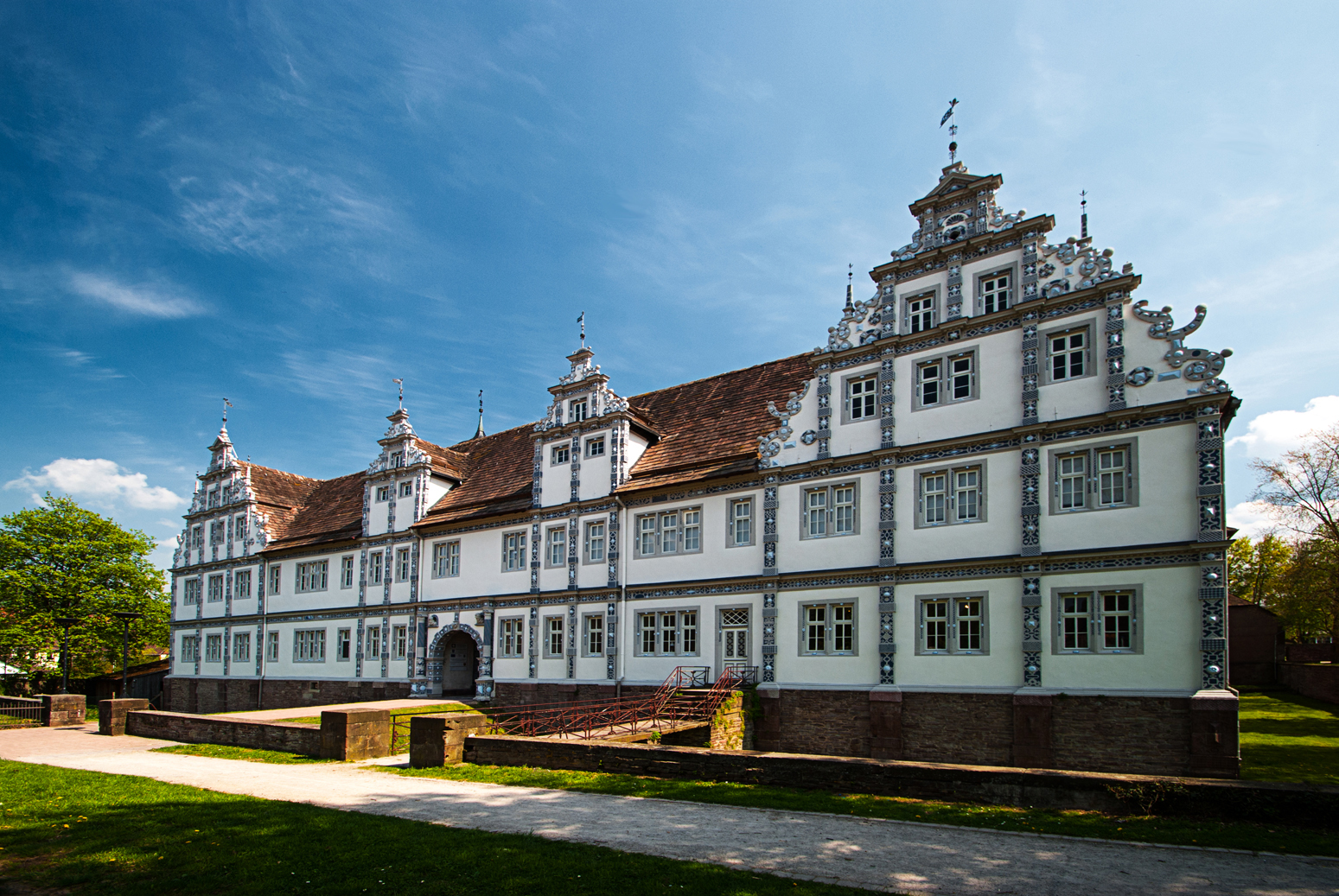 Weserrenaissance-Schloss in Bevern, Niedersachsen, Deutschland